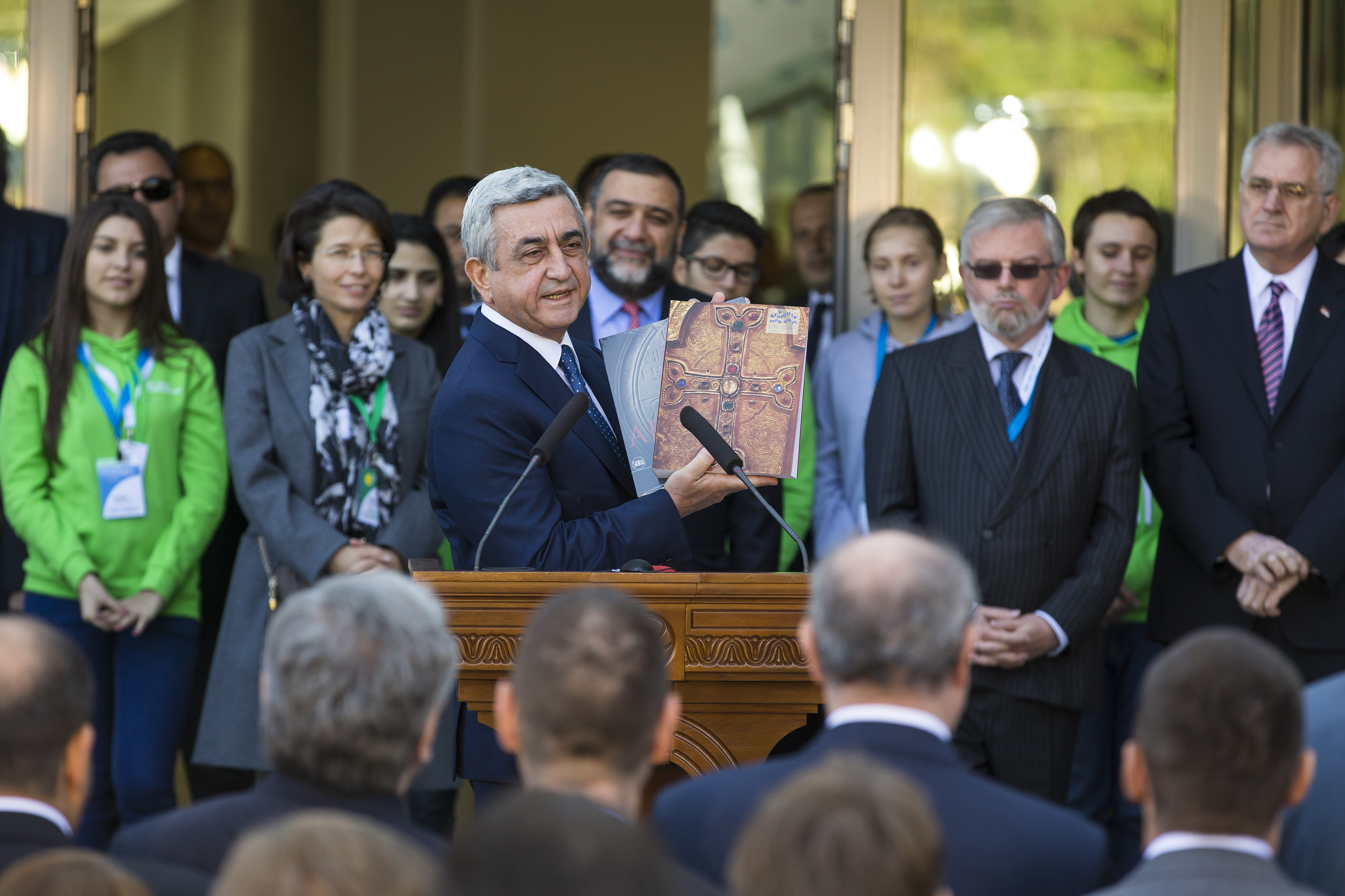 Президент Серж Саргсян на открытии UWC Dilijan.